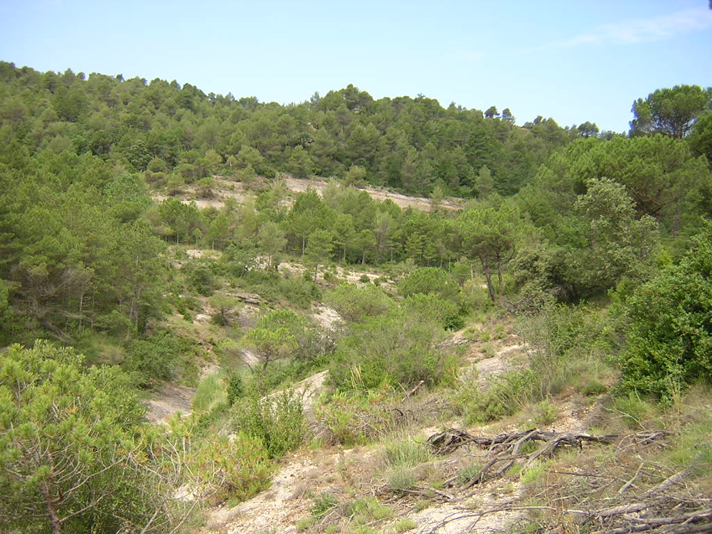 El torrent de la Baga Cerdana (Monistrol de Calders, Moianès)